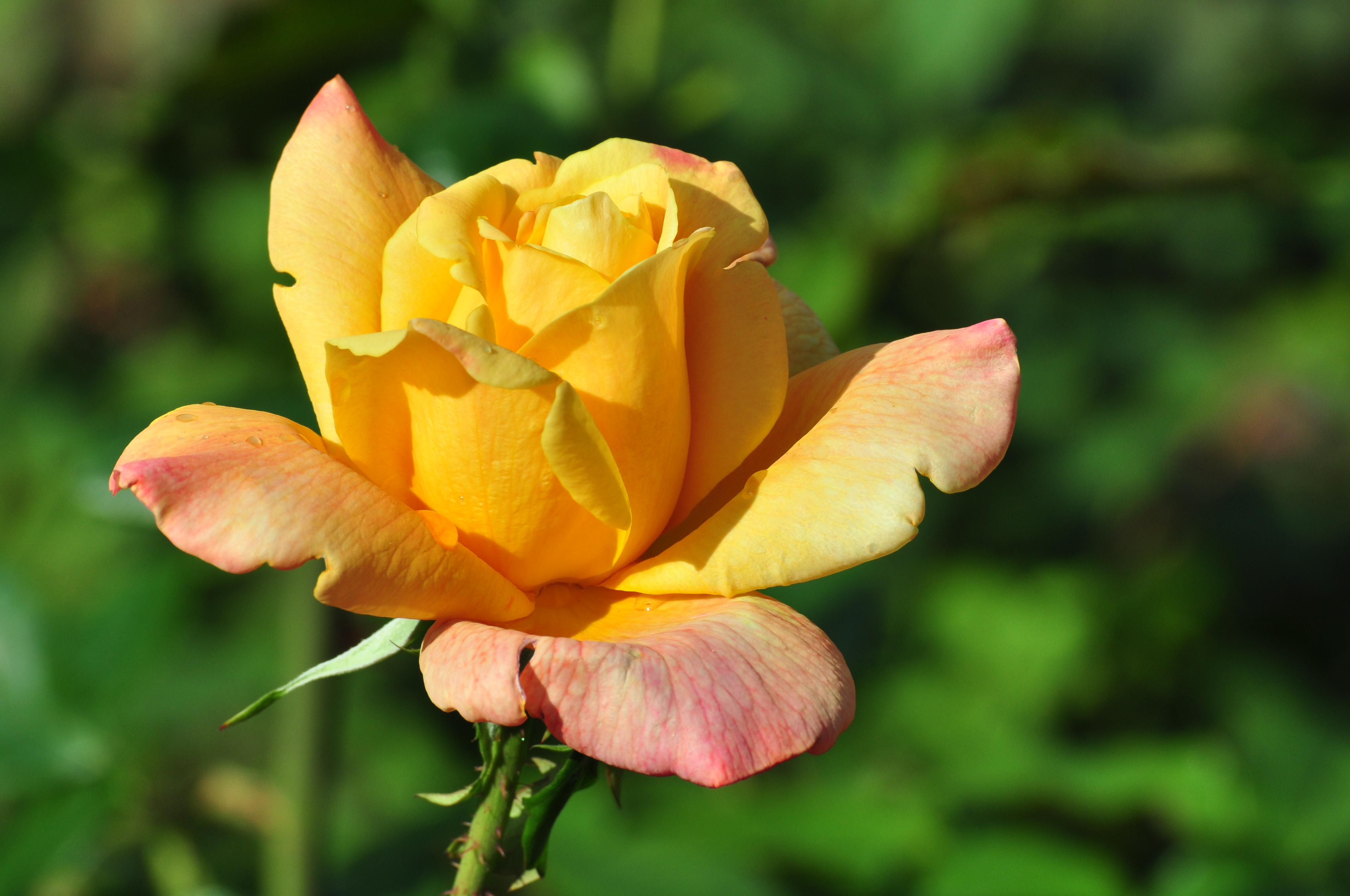 President Herbert Hoover (TH Coddington-Totty 1930) Duftrosengarten in Rapperswil (Switzerland)